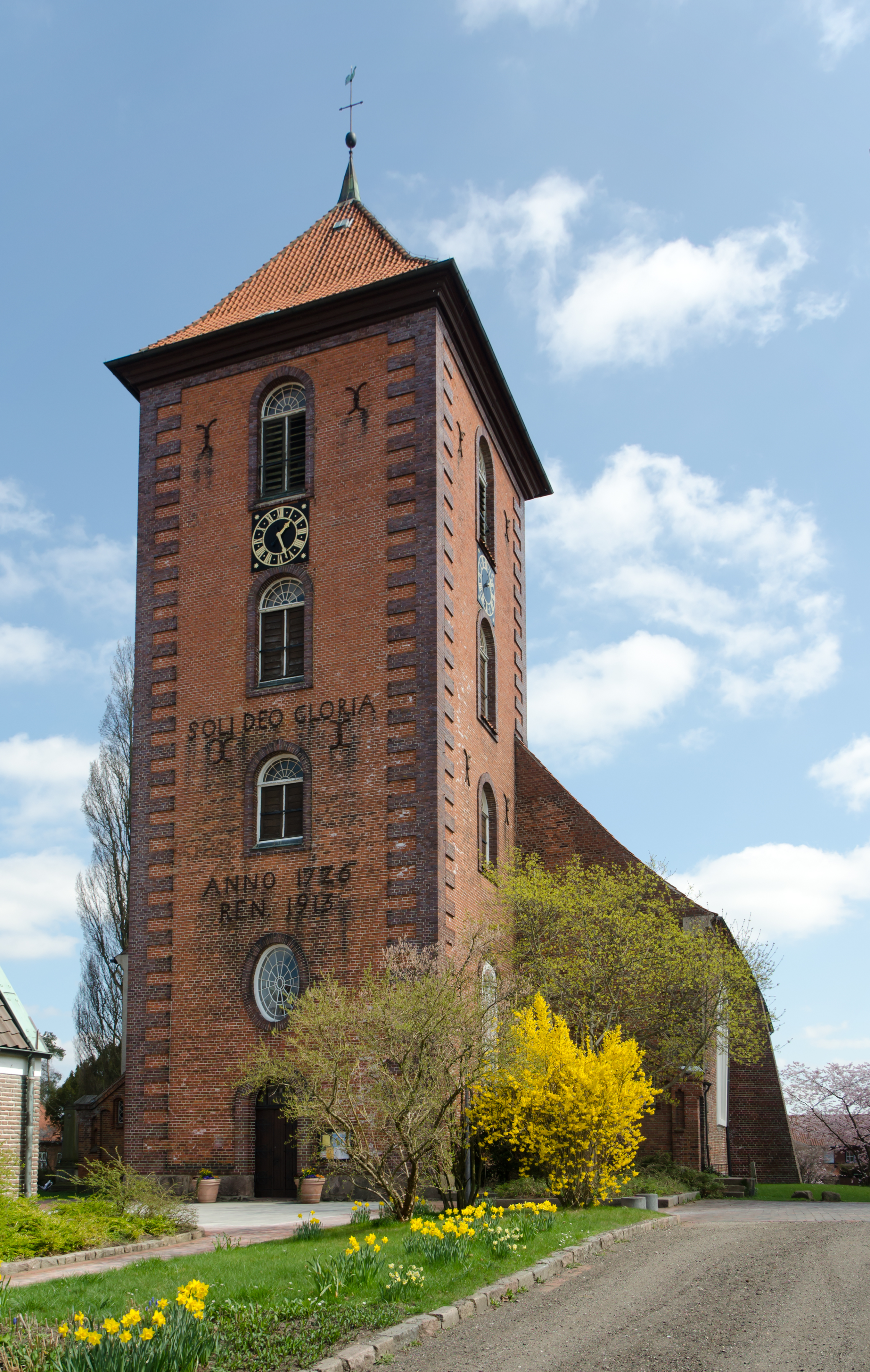 Preetz Kirche von Südwesten